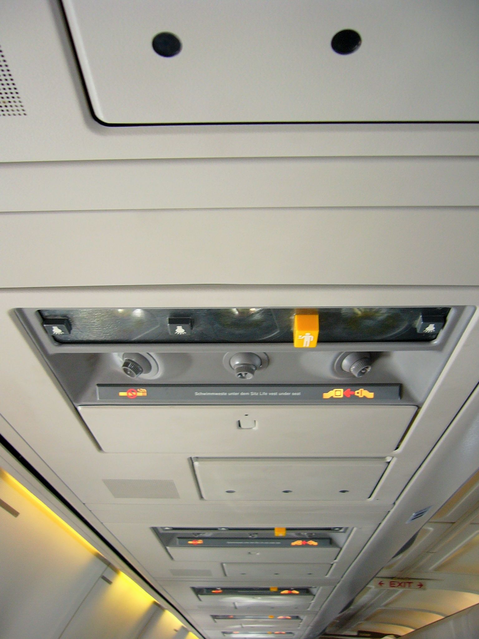 Bedienungselemente für Passagiere in einer Boeing 737